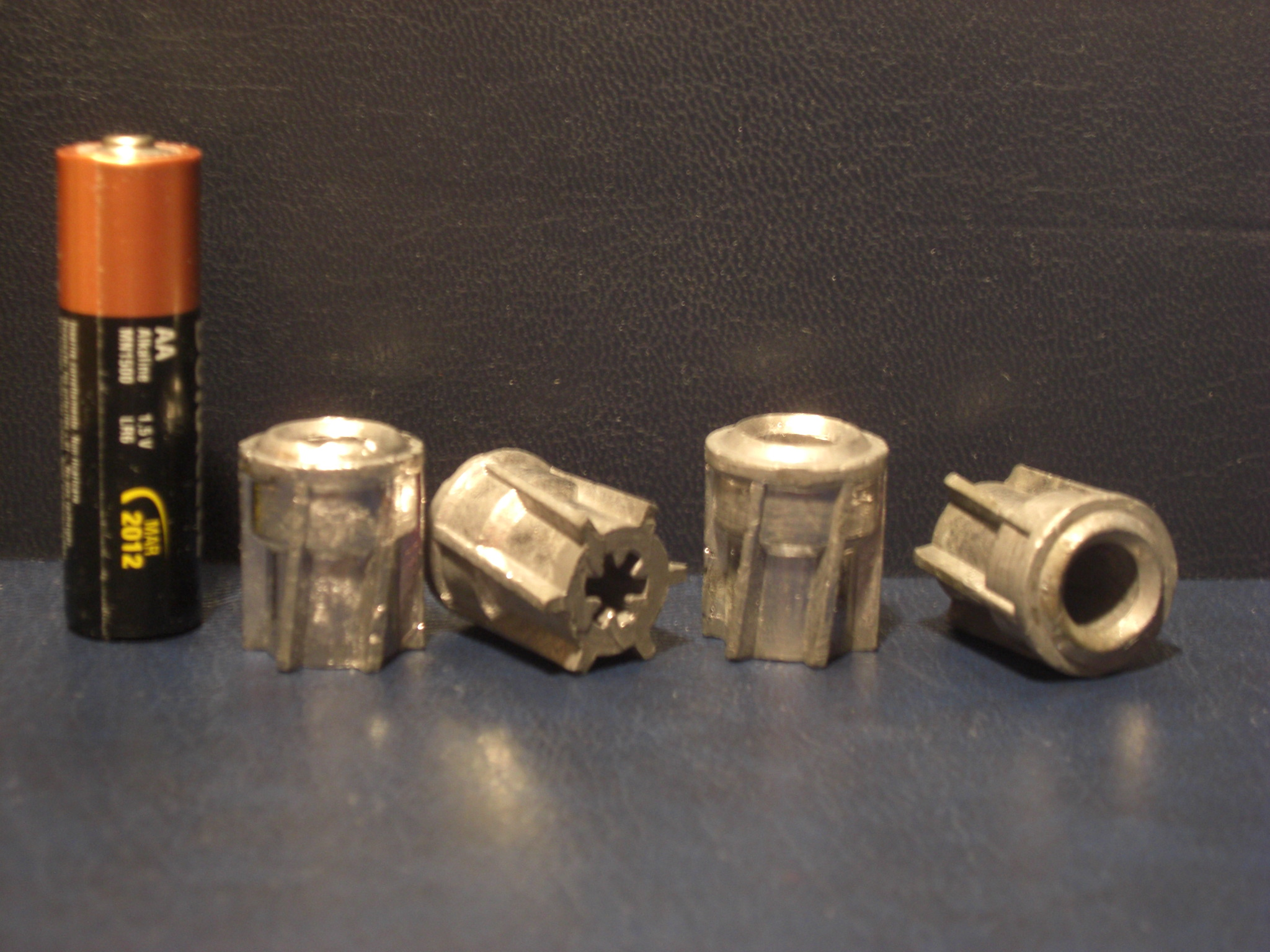 Mayera Slugs